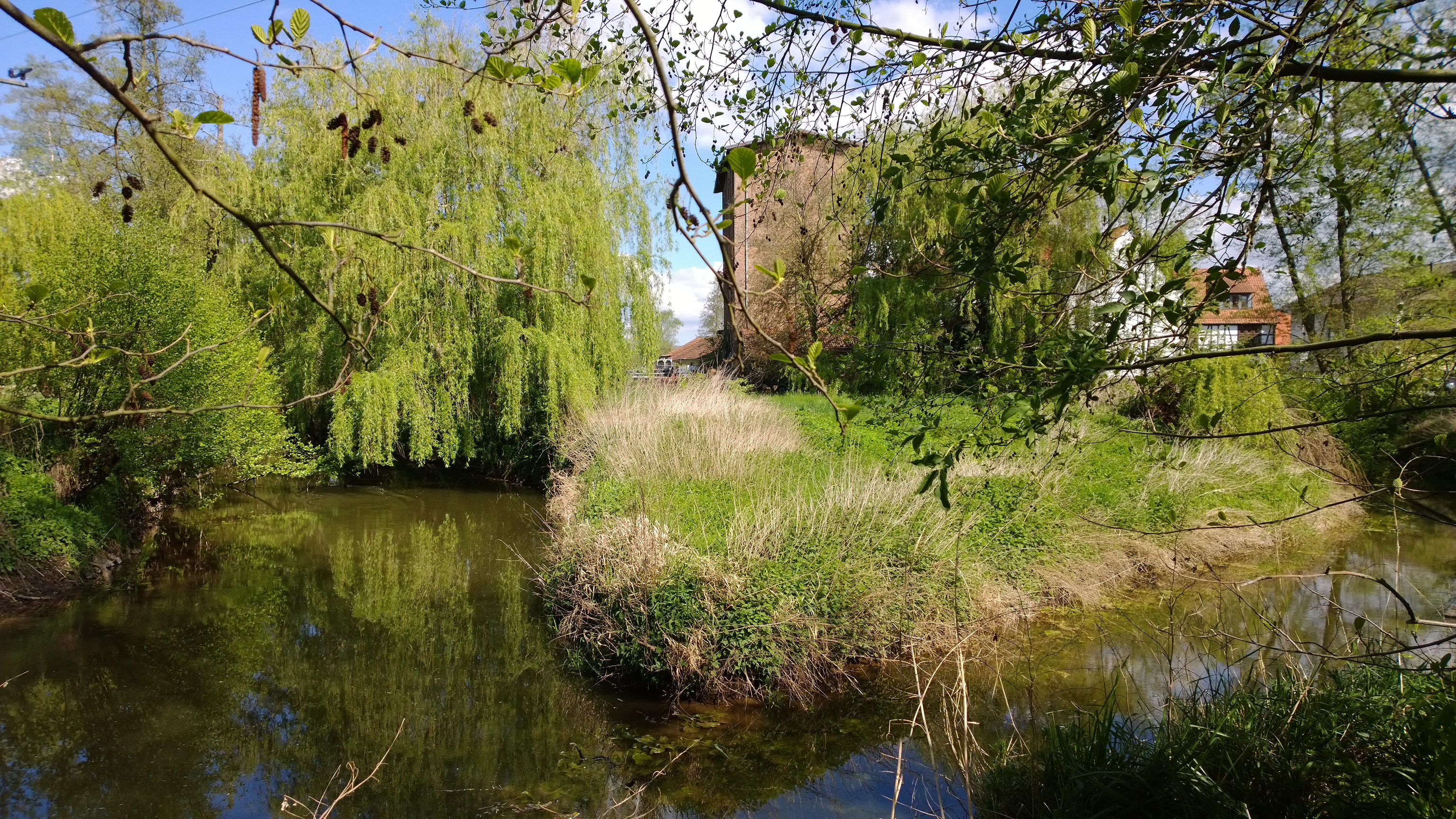 Die Nidderinsel, auf dem die Wasserburg stand, am südlichen Ende. Die Gebäude sind von der Mühle